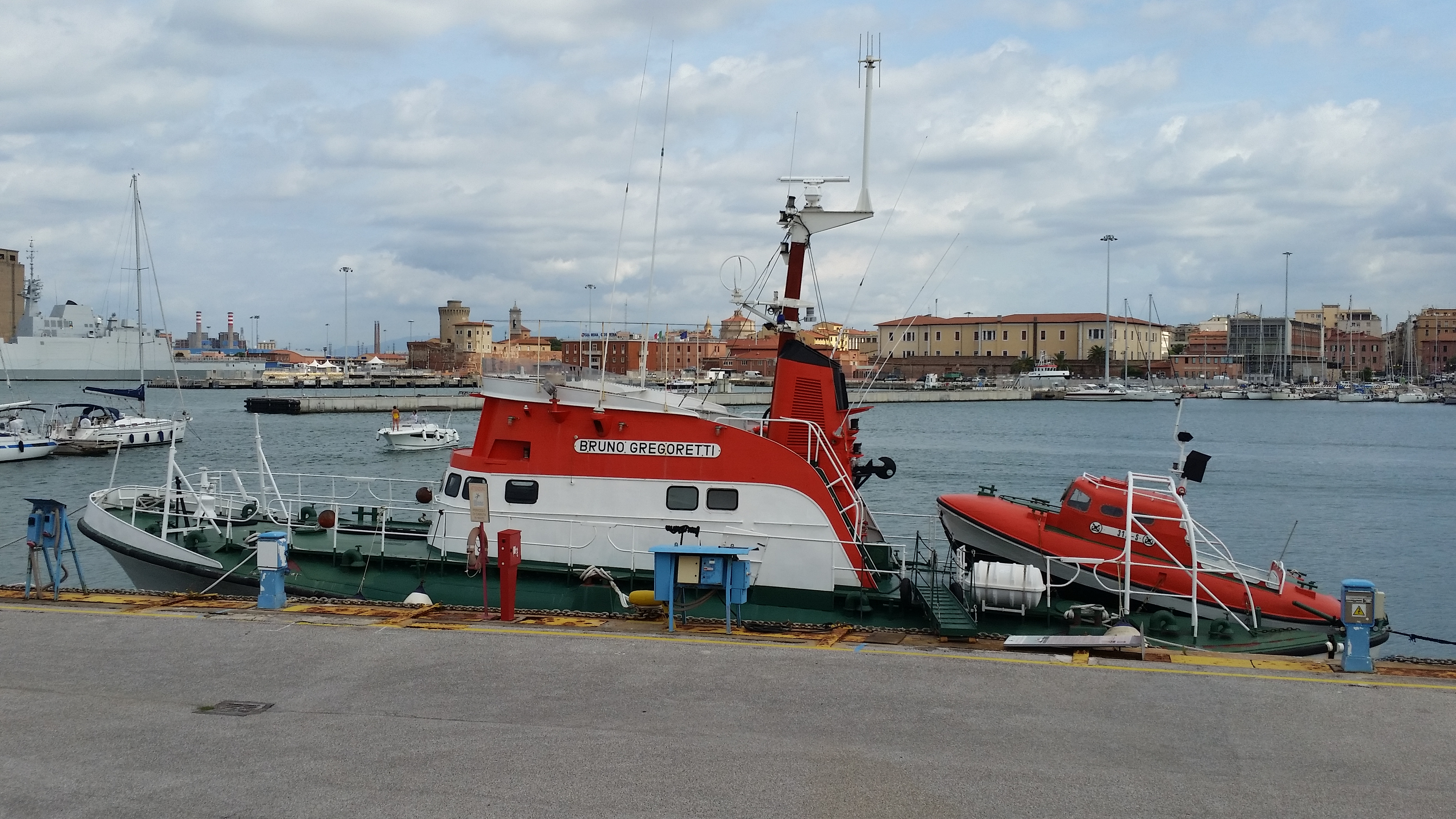 Bruno Gregoretti in DGzRS-Farbgebung im Hafen von Livorno